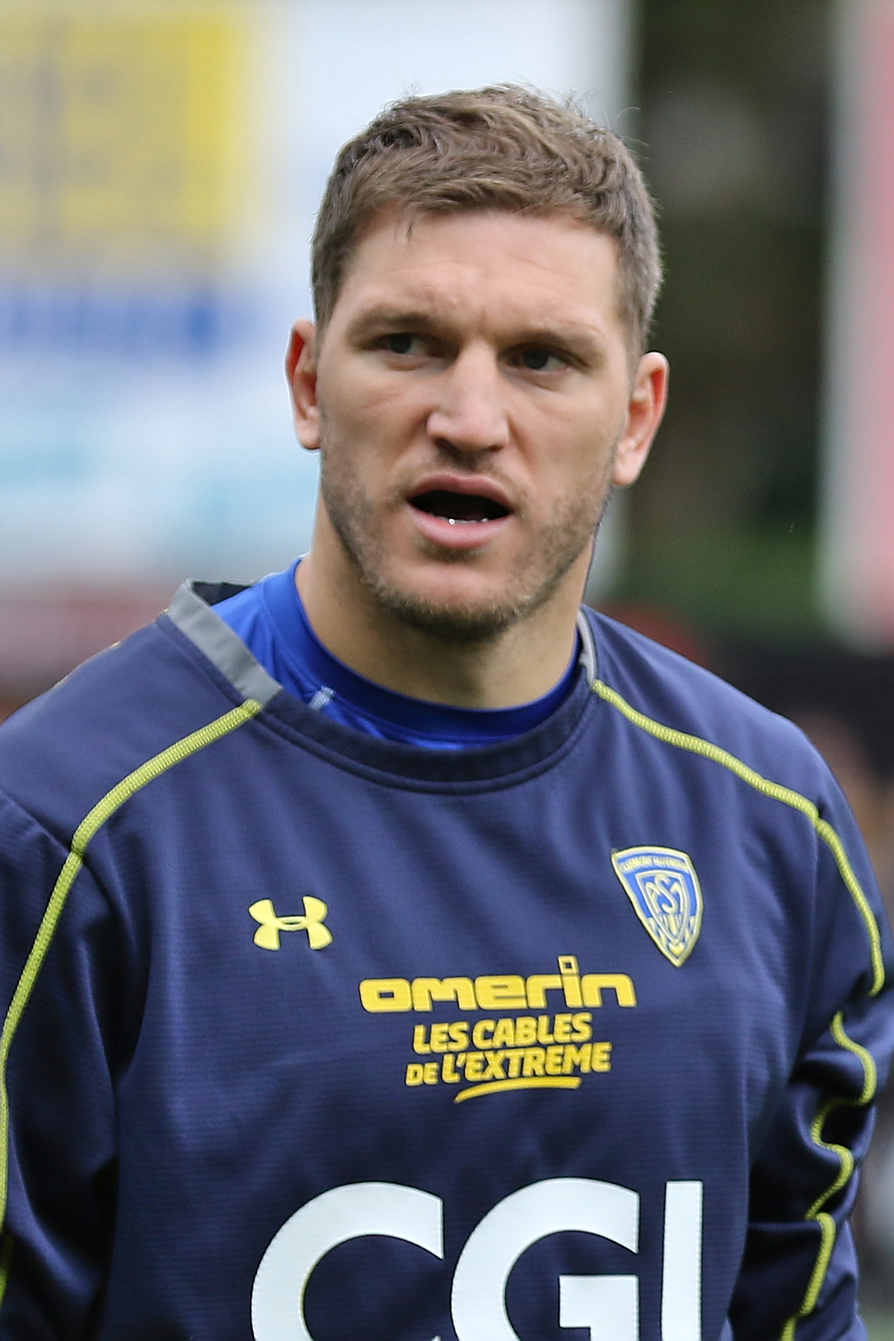 USO - ASM - 20150905 - Adrien Planté